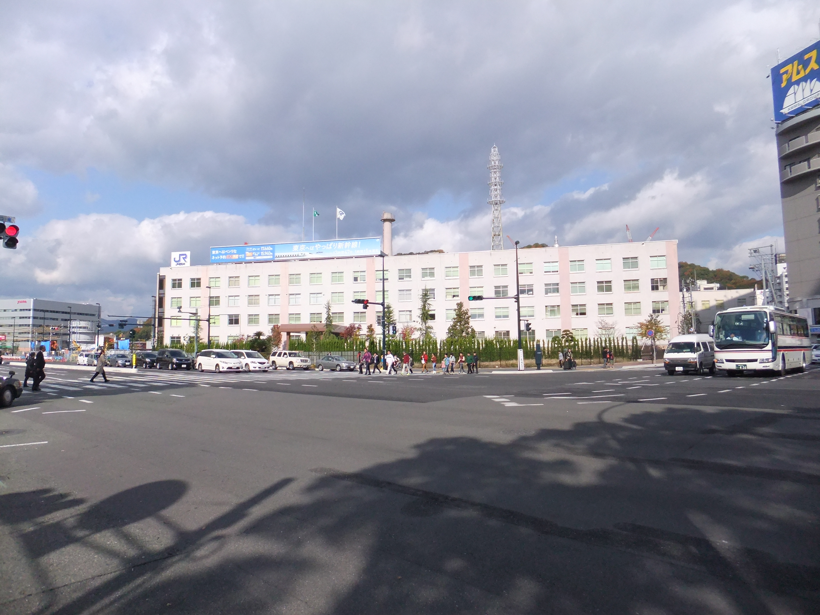 JR西日本 広島支社